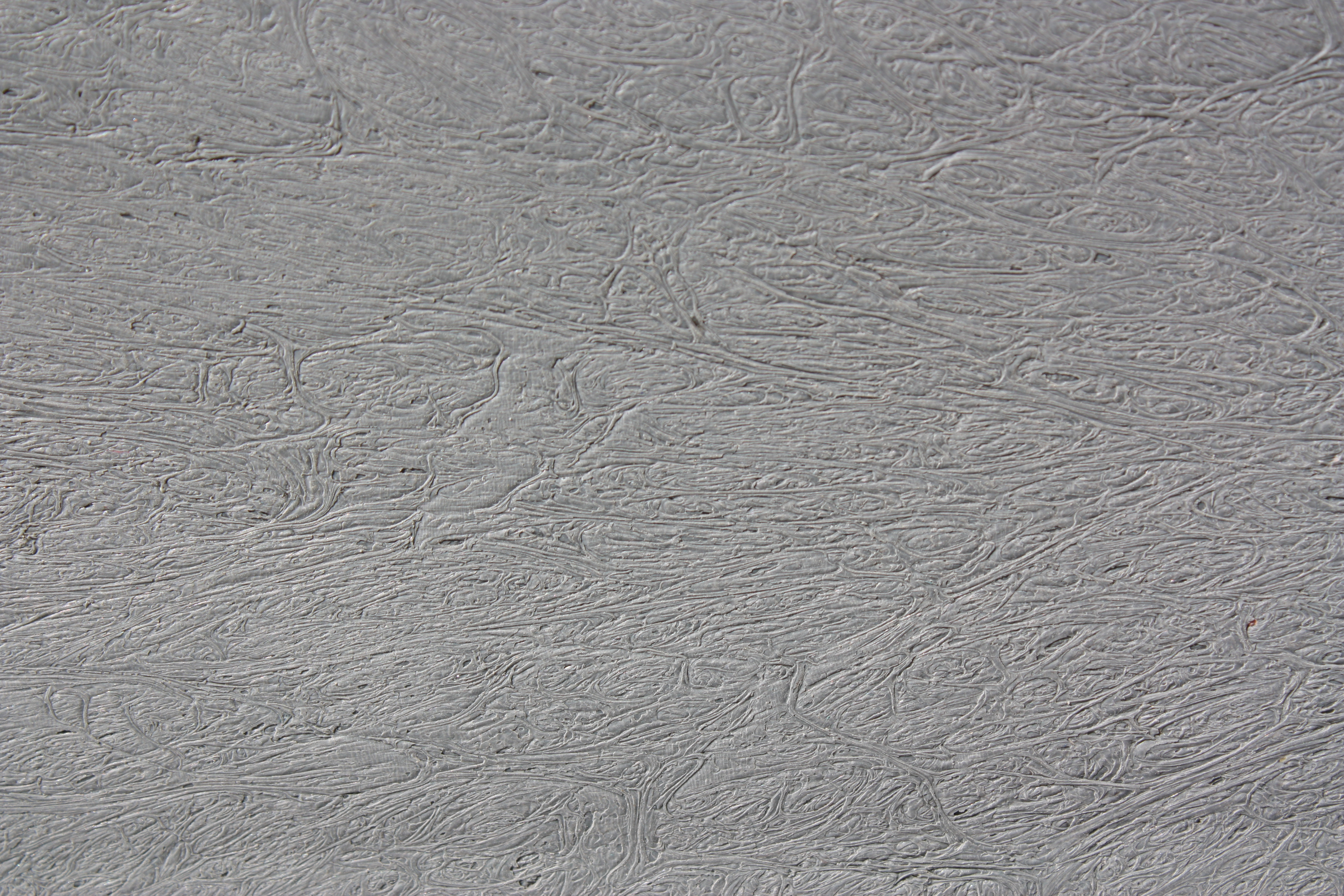 Texture de béton.